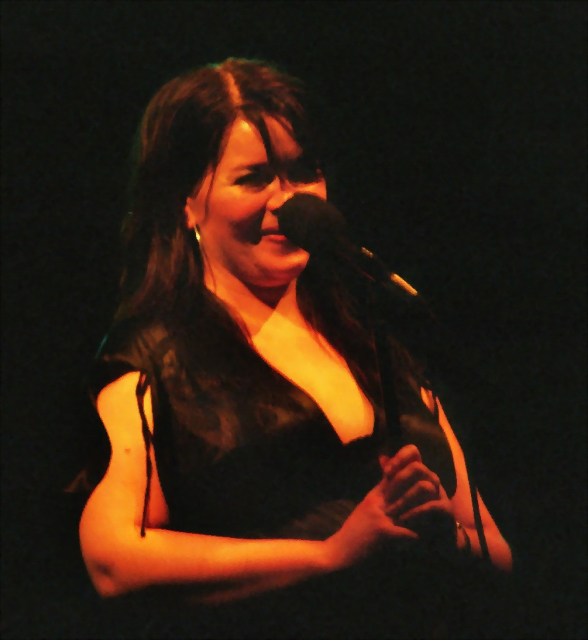 Solveig Slettahjell - Jazzfestival Neuwied 2006